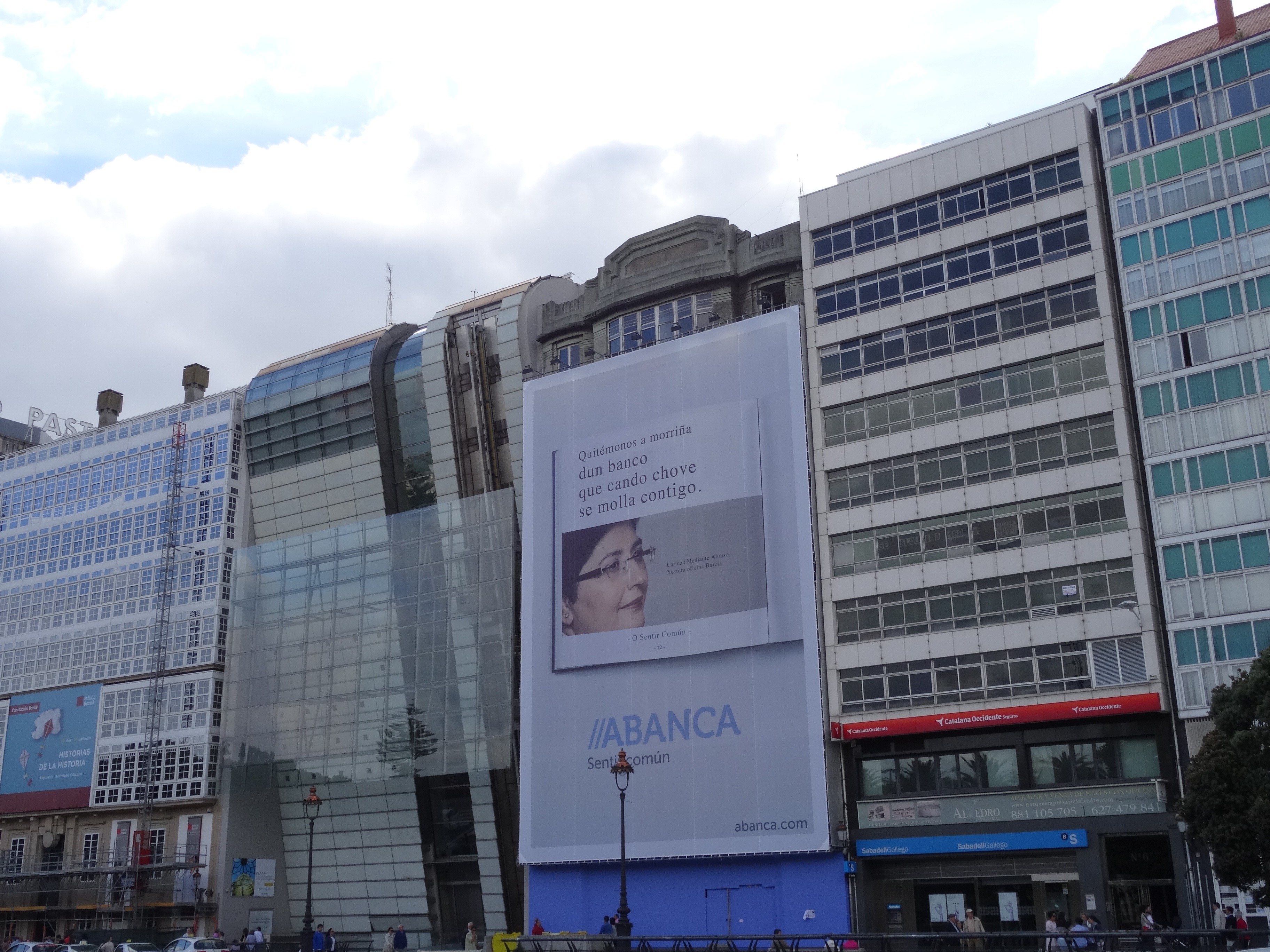 Anuncio de ABANCA o lado do Centro Sociocultural Fundación Novacaixagalicia na Coruña.